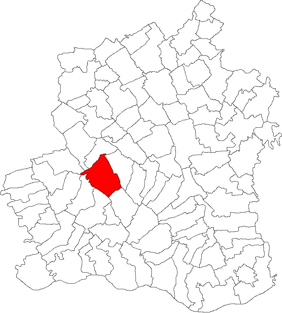 Categorie:Hărţi ale judeţului Teleorman